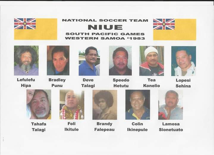 Recopilación de fotografías de los jugadores de la selección de Niue en los Juegos del Pacifico Sur de 1983 por Jacek Kosierb.